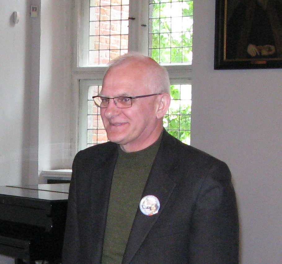 Marek Rubnikowicz w czasie Centralnego Zlotu Laureatów XVII edycji Ogólnopolskiego Młodzieżowego Konkursu Krajoznawczego „Poznajemy Ojcowiznę”, Toruń 2010.